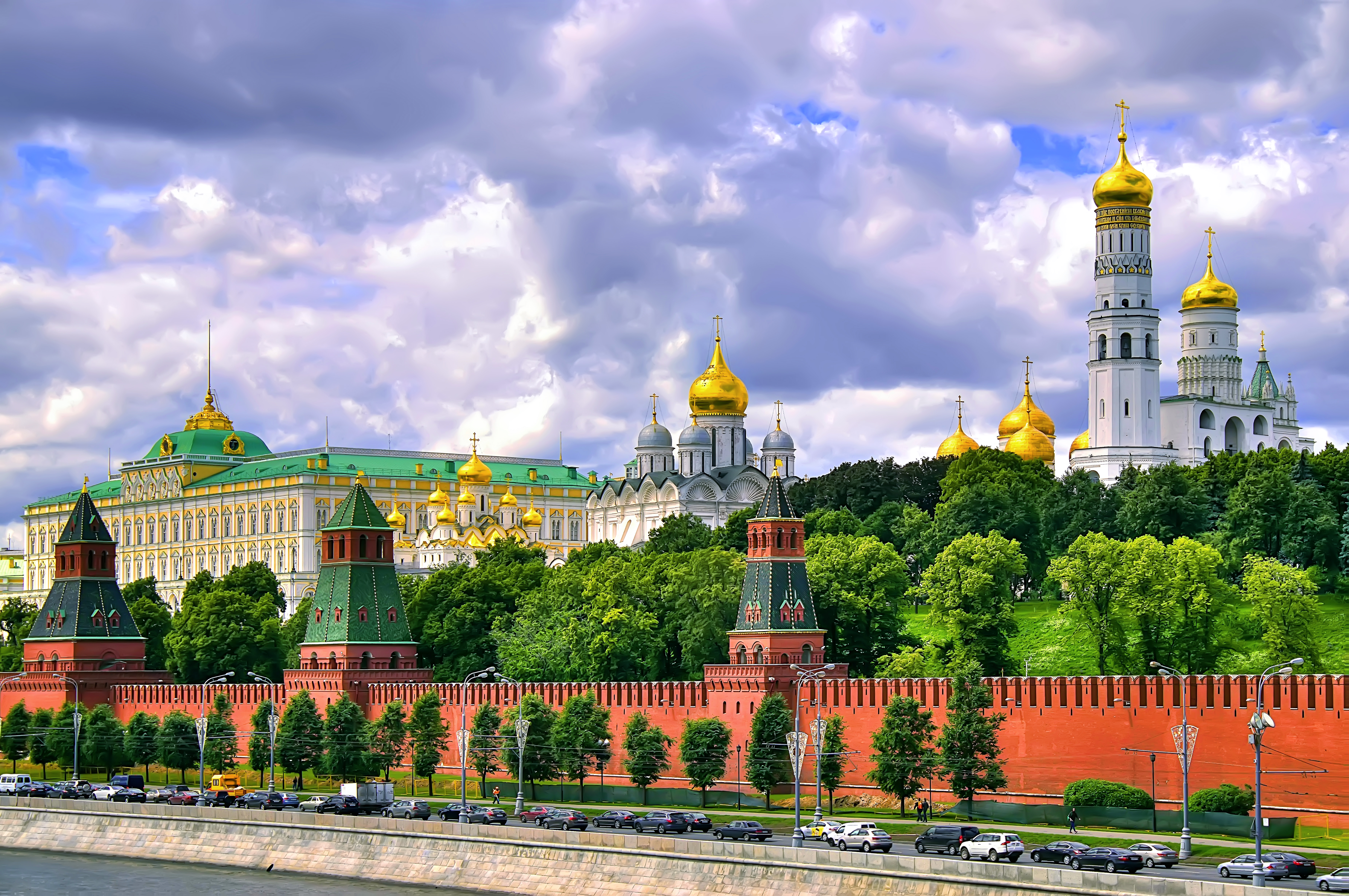 Московский Кремль - ансамбль памятников архитектуры XV-XVI: Московский Кремль, Тверской, Центральный округ, Москва